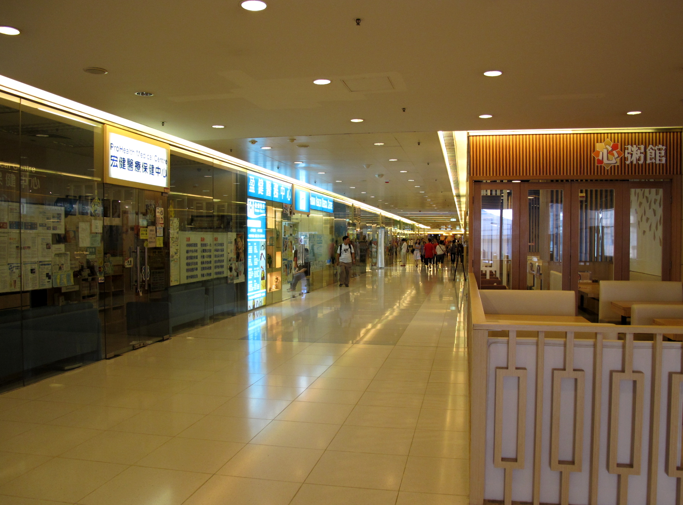 Liberte Place